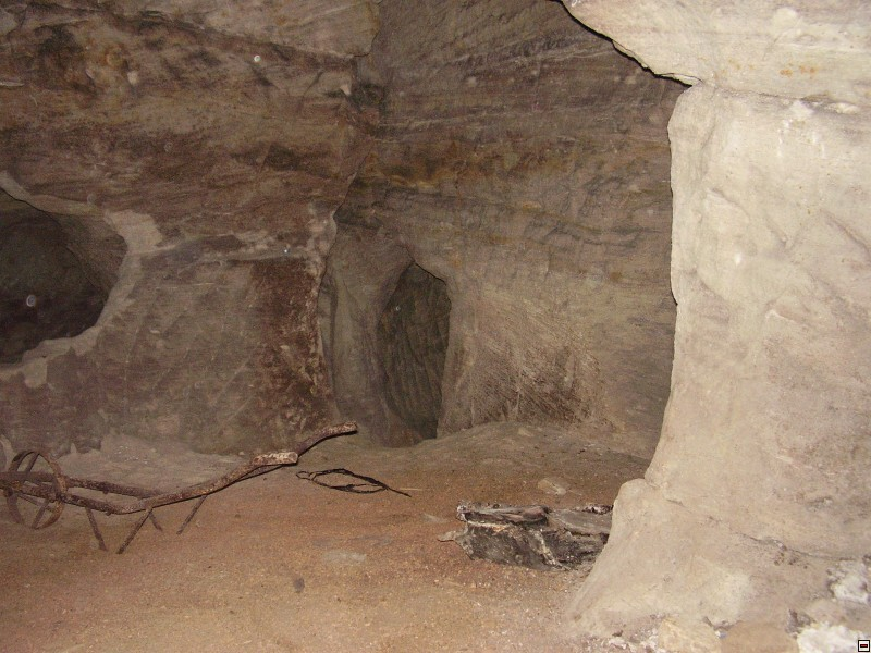 Fotka z podzemního komplexu Bílý Kůň - lokalita Hutě (Praha 14)